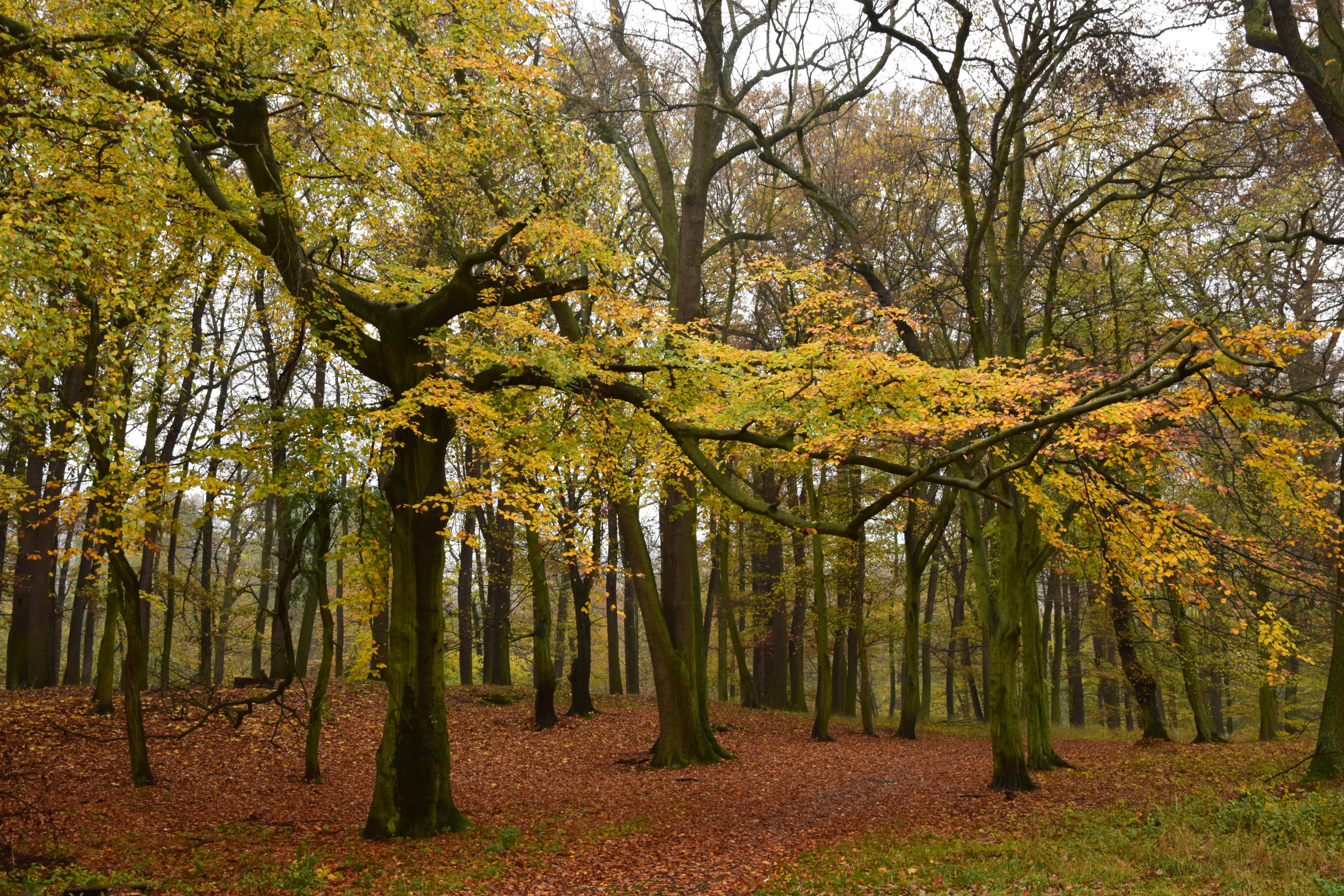 Přírodní památka Červený Hrádek – buk lesní u hlavní cesty v oboře